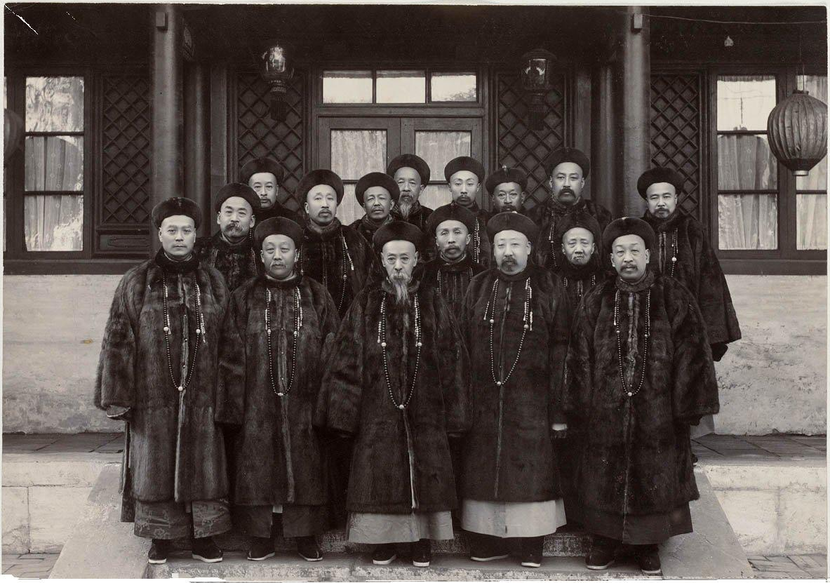 清·皇族內閣